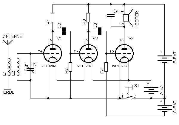 Loewe OE333 Audion Schaltplan